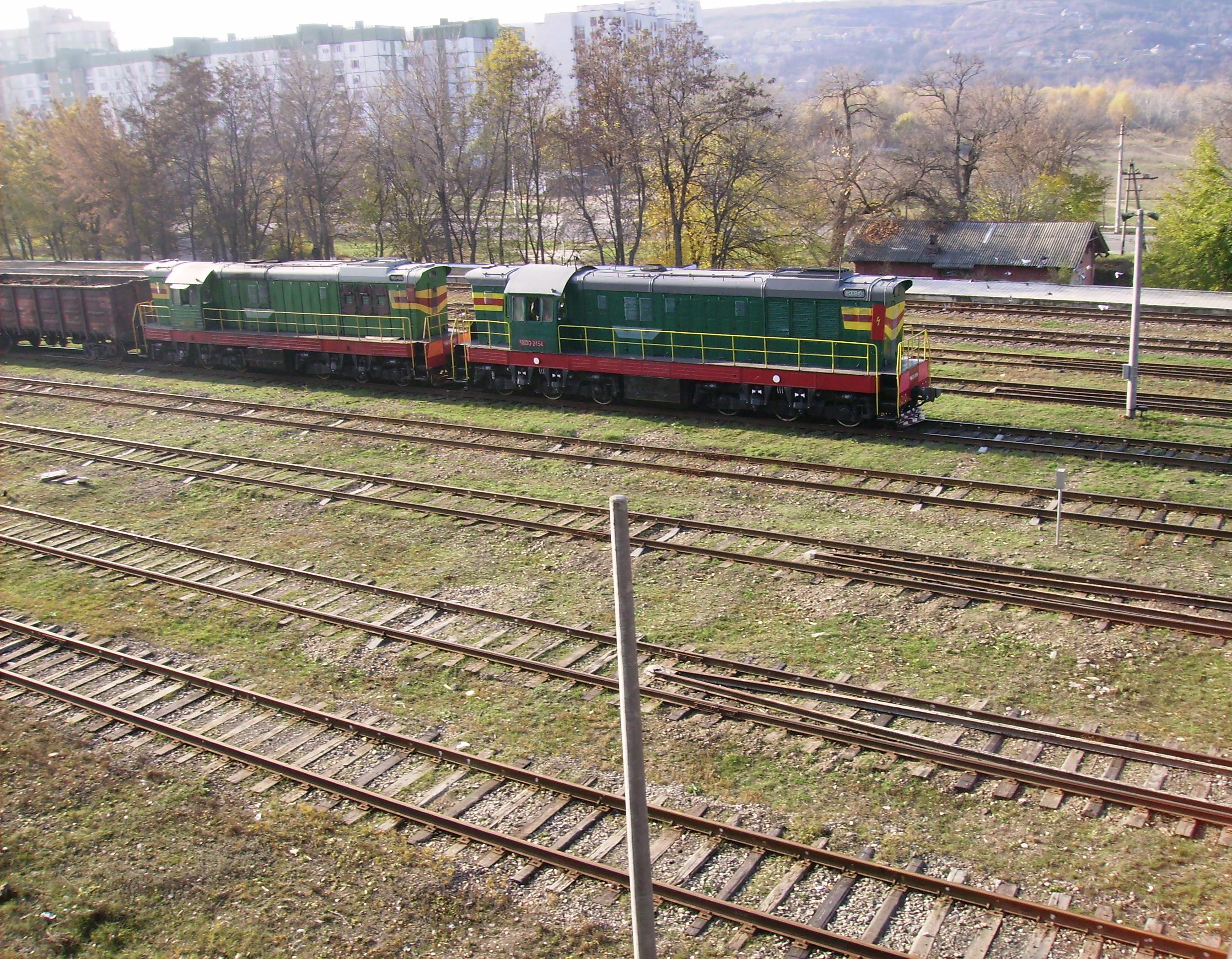 Два маневровых тепловоза на Рыбницком железнодорожном вокзале